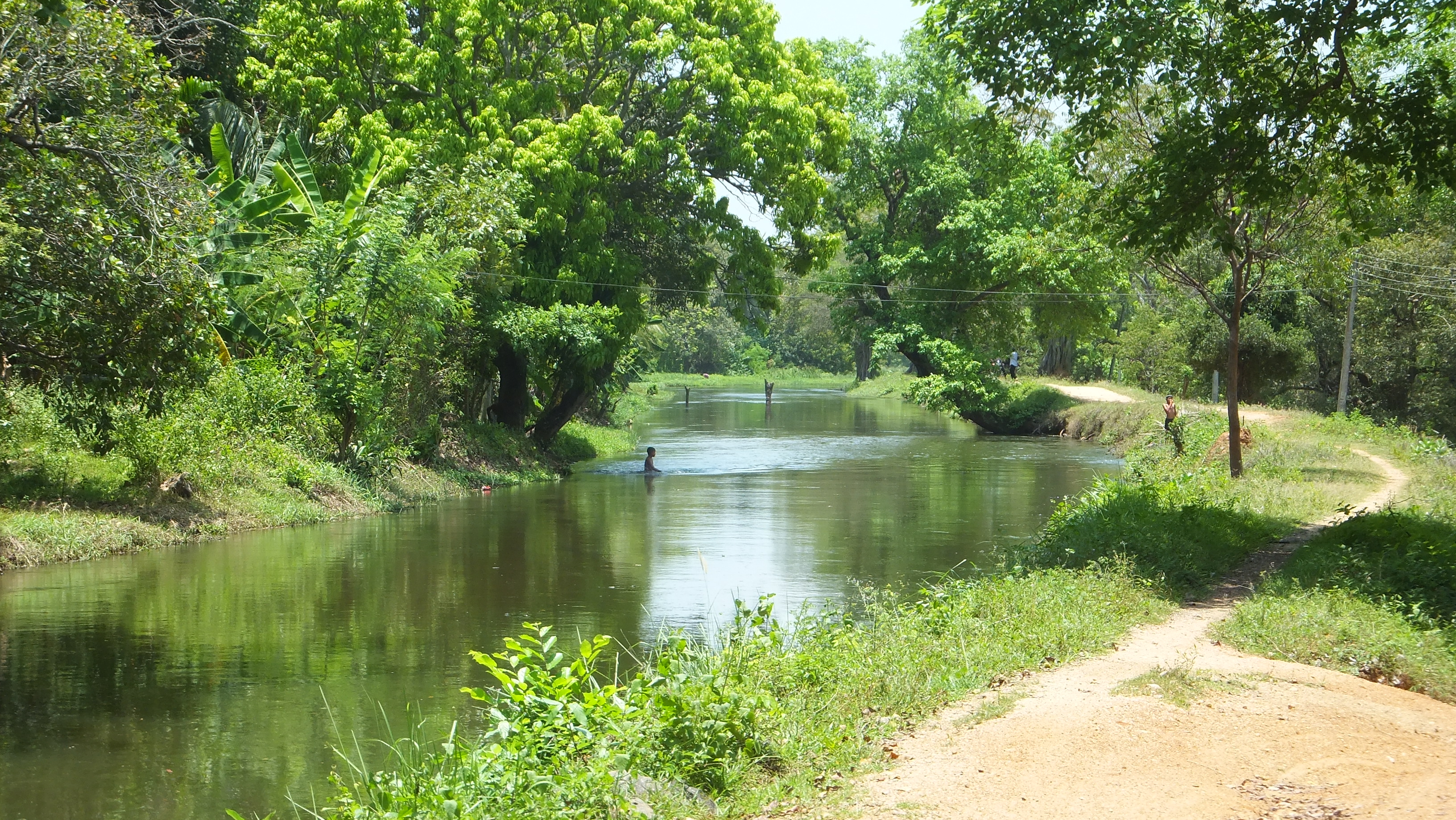 සිංහල: මින්නේරිය ජලාශයේ ජලය බෙදාහැරෙන යෝධ ඇල